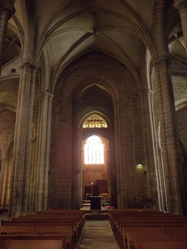 Vue vers l'occident du chœur de la basilique Notre-Dame de Bon-Secours de Guingamp (22). .